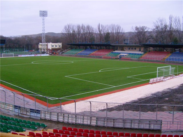 Kotola001